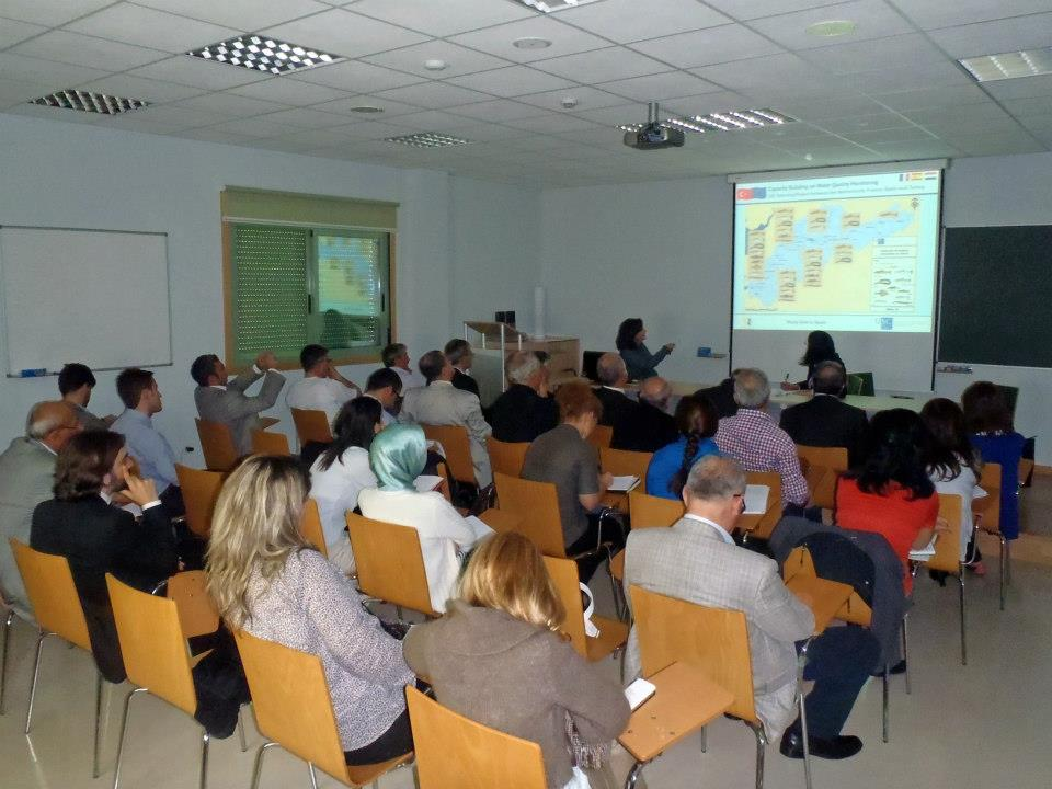 Visita de una delegación del Proyecto TWINNING a la Estación de Hidrobiología "Encoro do Con"